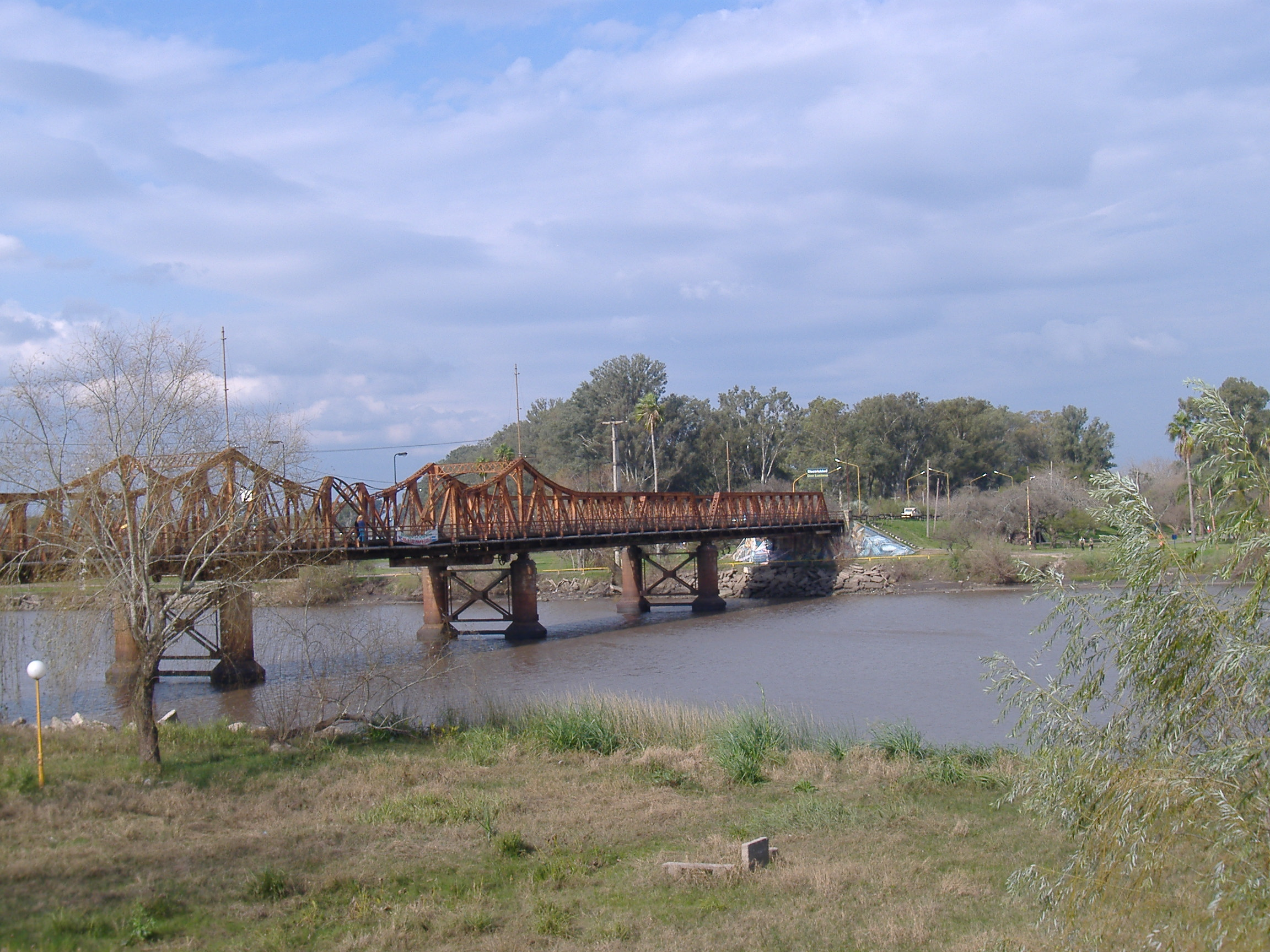 Méndez Casariego Bridge over Gualeguaychu River opened in 1931 in Gualeguaychú, Entre Ríos, Argentina.